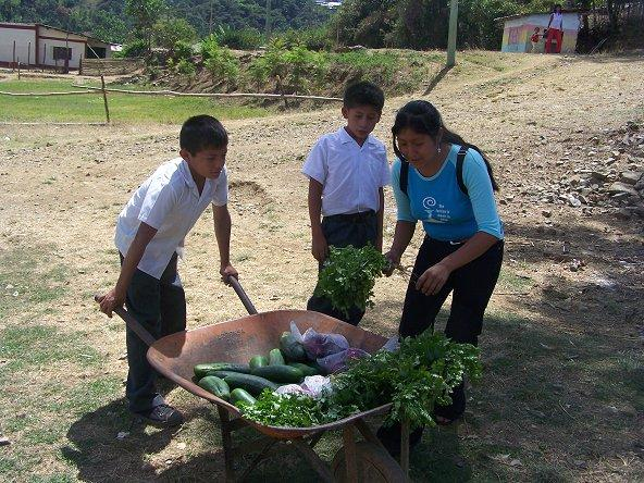 Niños aprendiendo agricultura